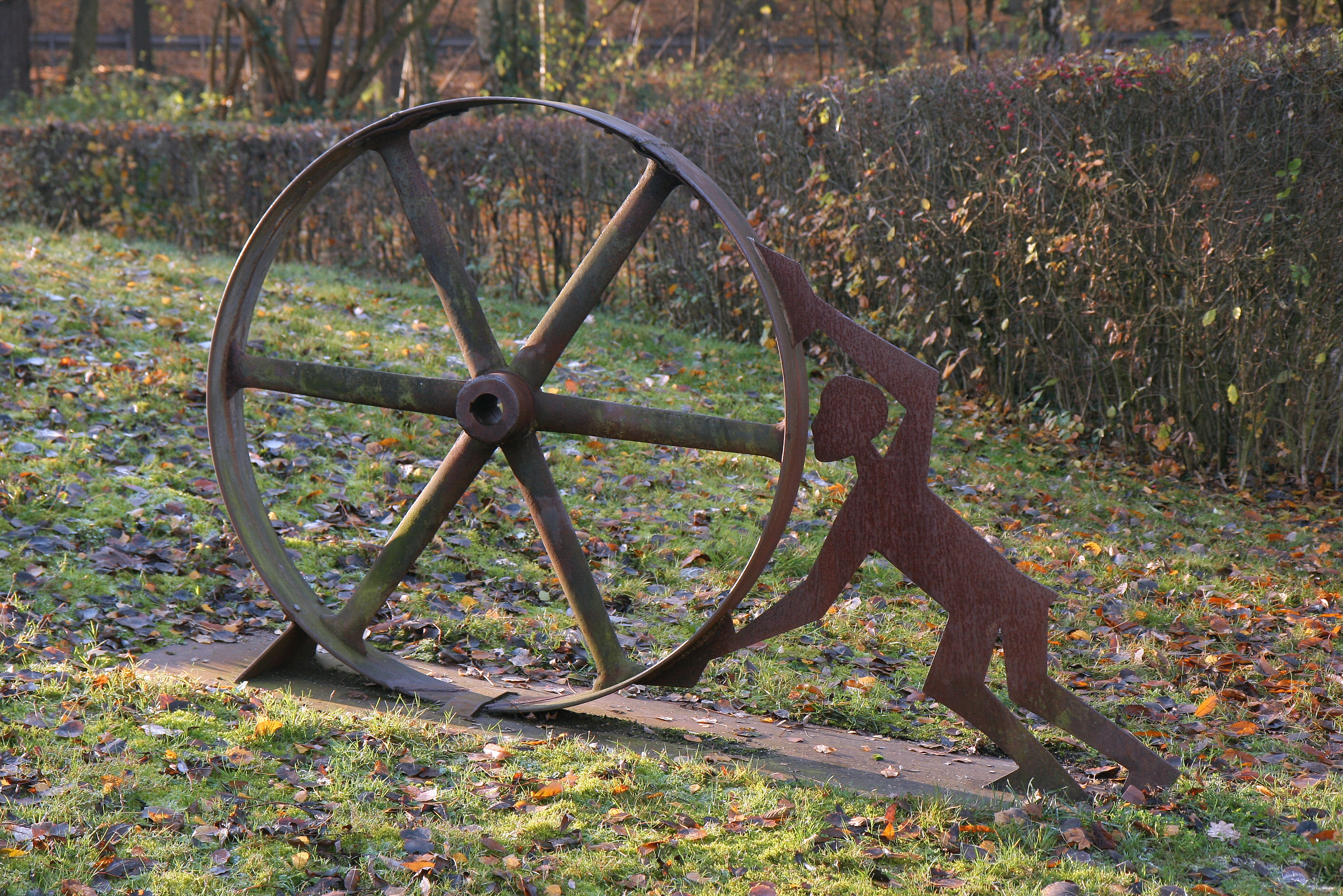 Eisenskulptur Sisyphos (2000) des Künstlers Horst Dieter Gölzenleuchter in den Außenanlagen der Historischen Fabrikanlage Maste-Barendorf in Iserlohn.